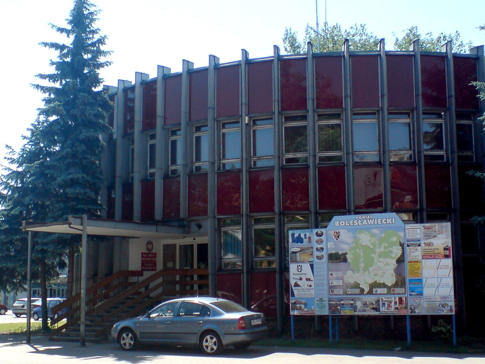 Główna siedziba władz powiatu bolesławieckiego, województwo dolnośląskie